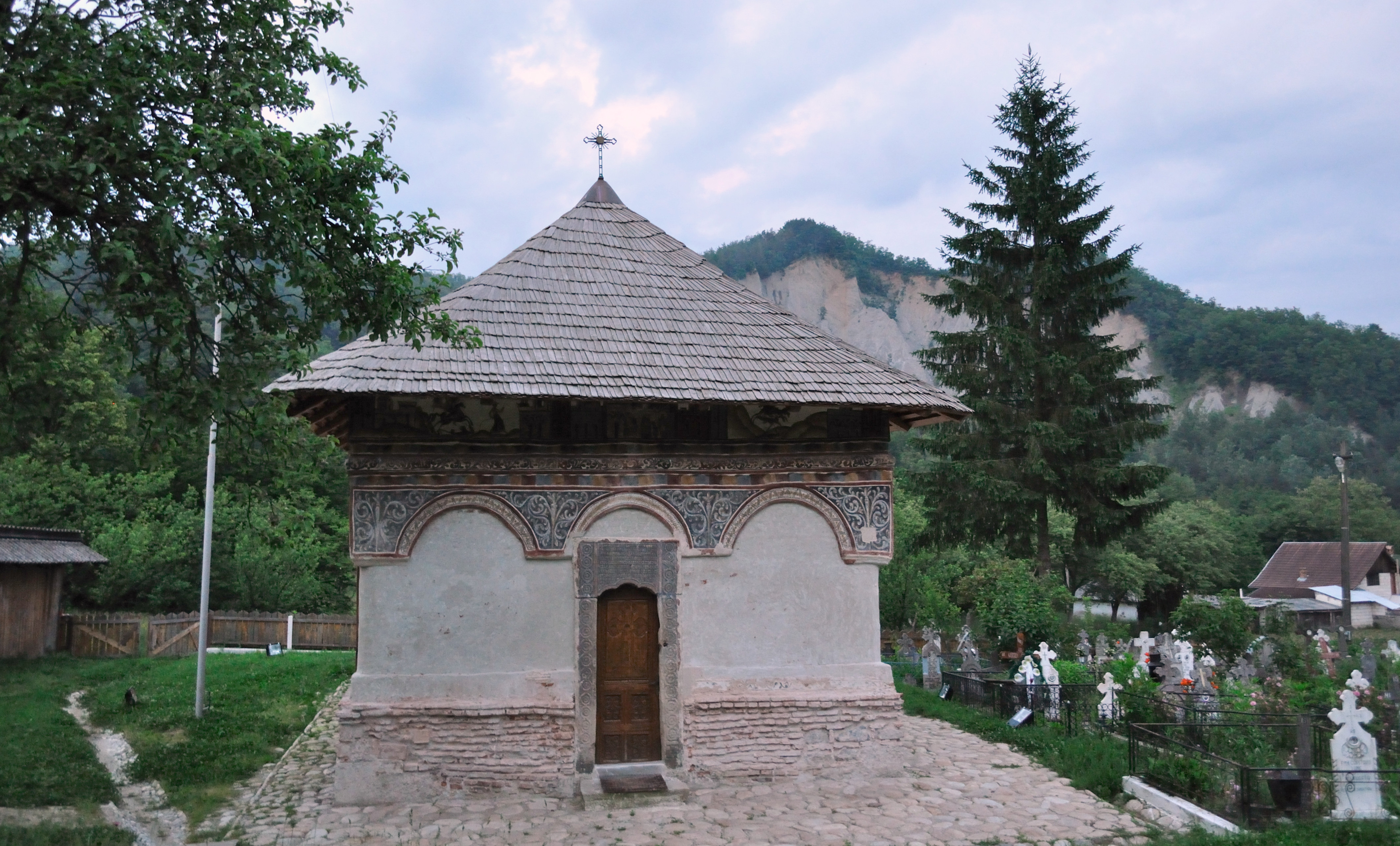 Biserica monument „Intrarea în Biserică”, sat Gorunești, Vâlcea